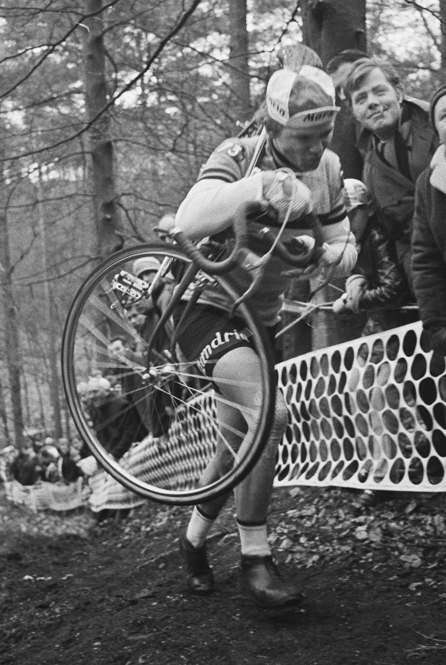 Wereldkampioenschappen veldrijden op de fiets, Apeldoorn; nr. 9, 11: E. de Vlaeminck in aktie; nr. 10, 12: C. Zoontjes in aktie.